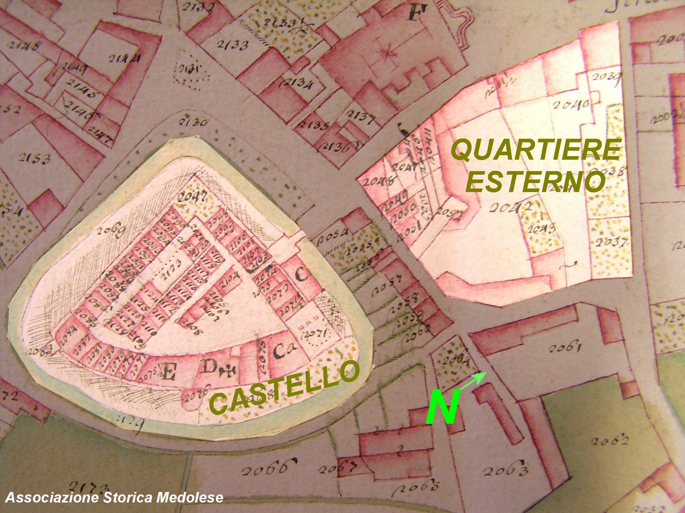 Medole. Catasto teresiano. Particolare di mappa del 1777 con evidenziati gli antichi perimetri del Castello e del Quartiere militare.